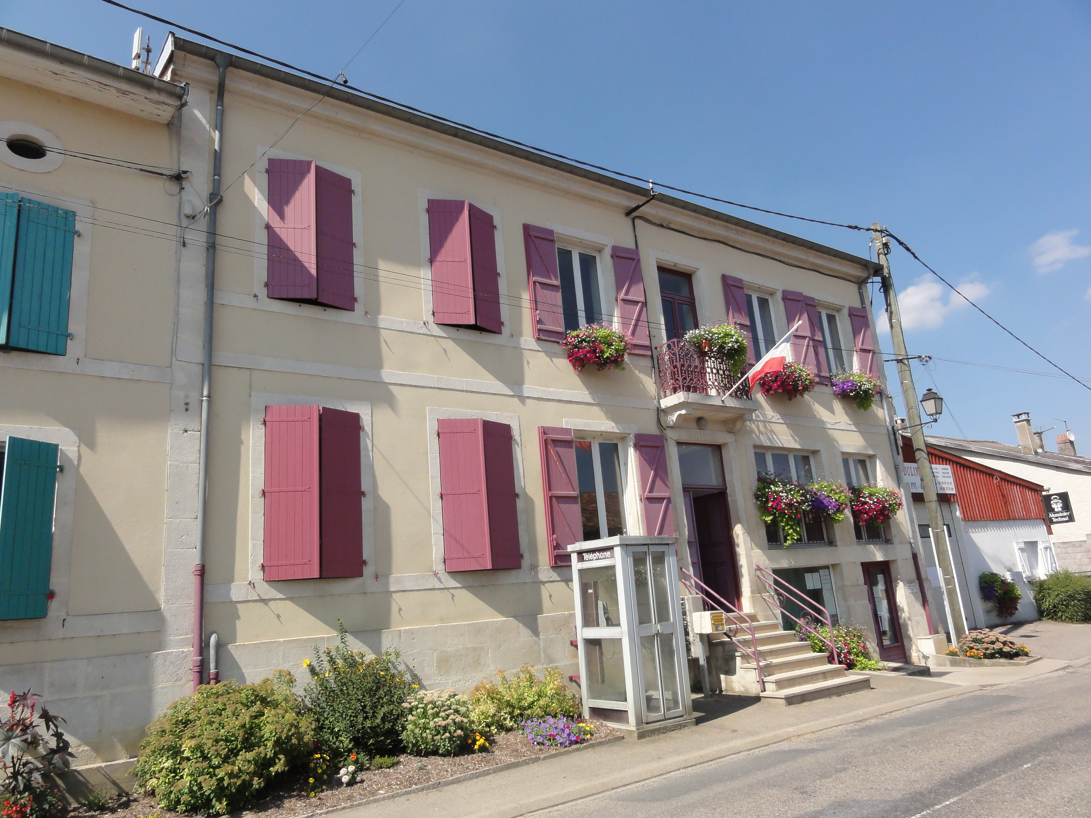 Boncourt-sur-Meuse (Meuse) mairie